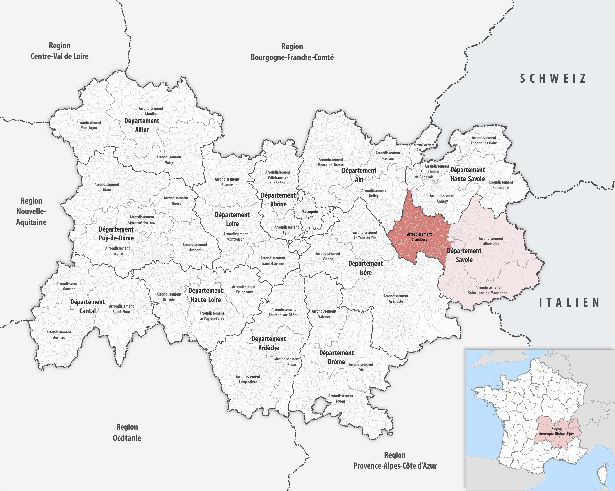 Lage des Arrondissements Chambéry